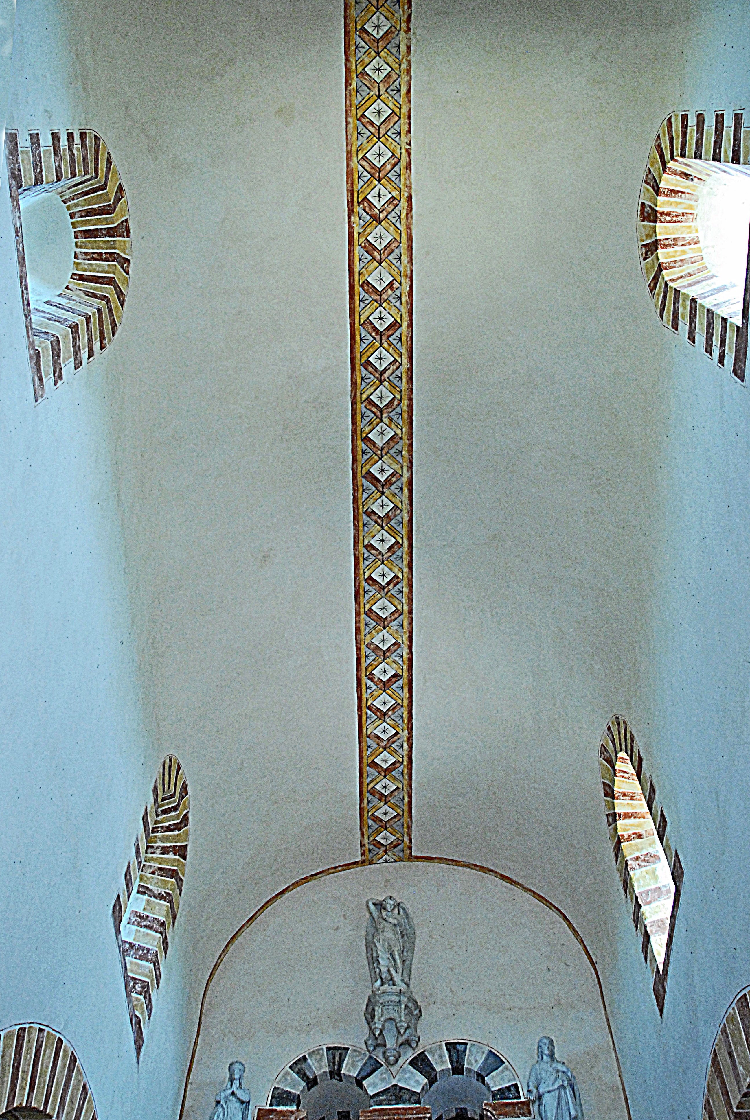 St.-Jean Glaine-Montaigut, Gewölbe im Mittelschiff